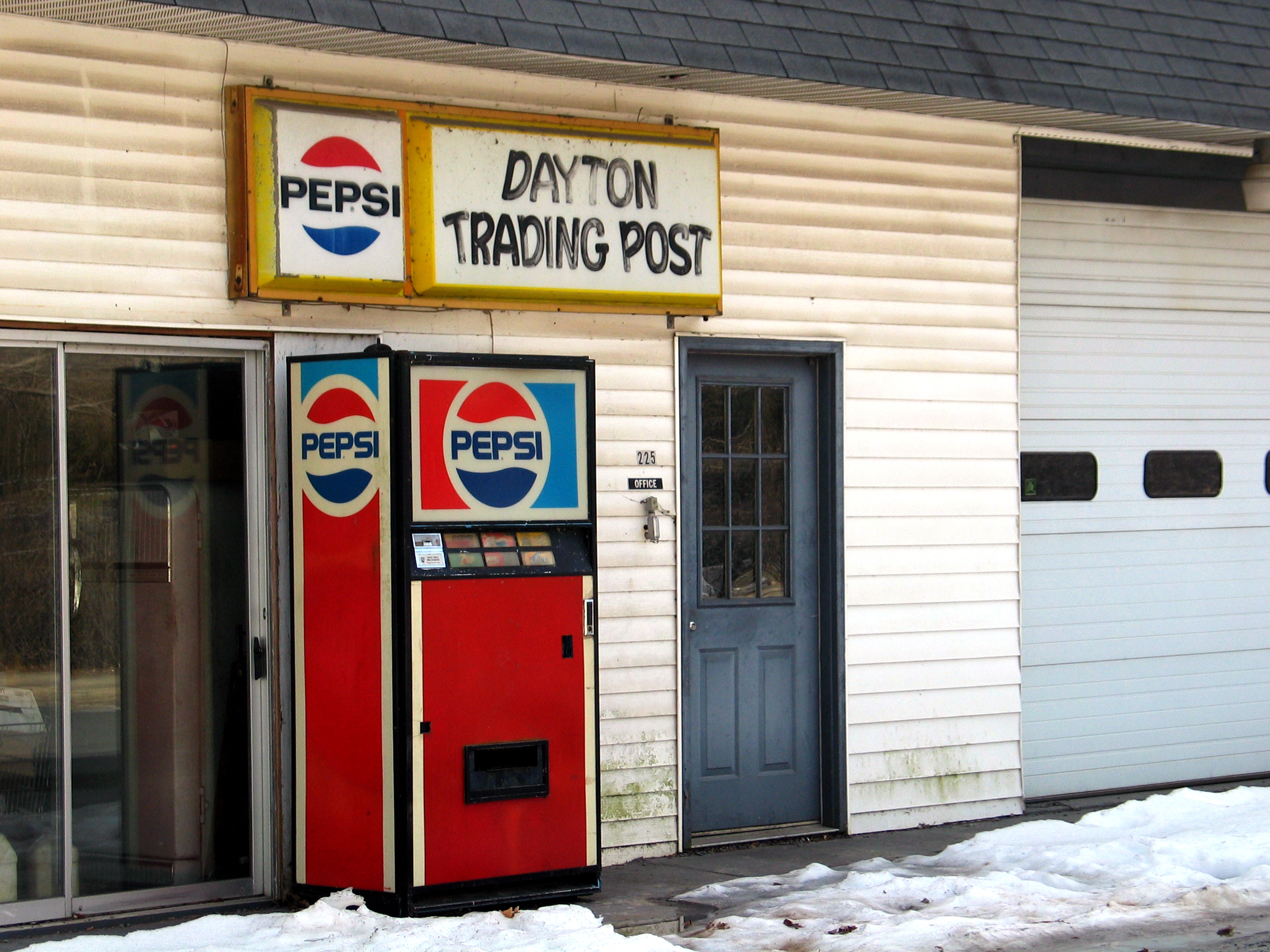 Dayton VA